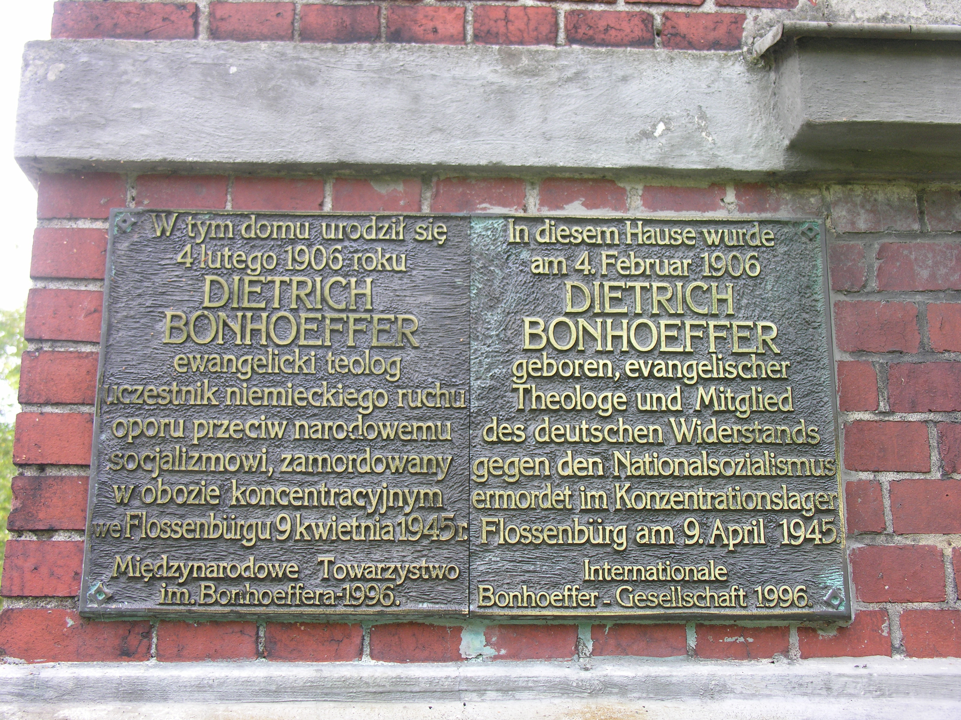 Gedenktafel am Geburtshaus von Dietrich Bonhoeffer in Breslau, Bartel-Straße 7 (früher Am Birkenwäldchen 7).